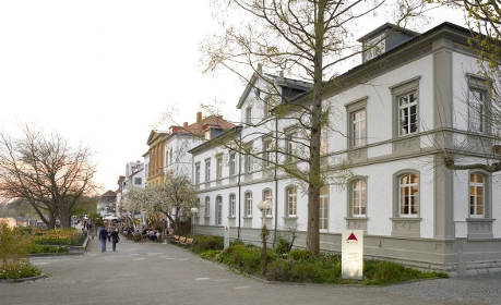 Akademie für Führungskräfte der Wirtschaft GmbH Seepromenade 19 D-88662 Überlingen